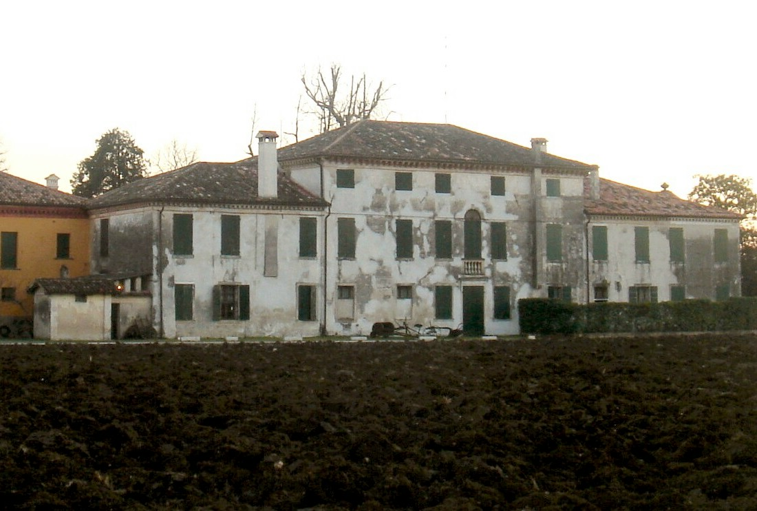 Castello Roganzuolo (Treviso): Villa Malvolti (XVIII secolo), lato nord dell'edificio padronale.